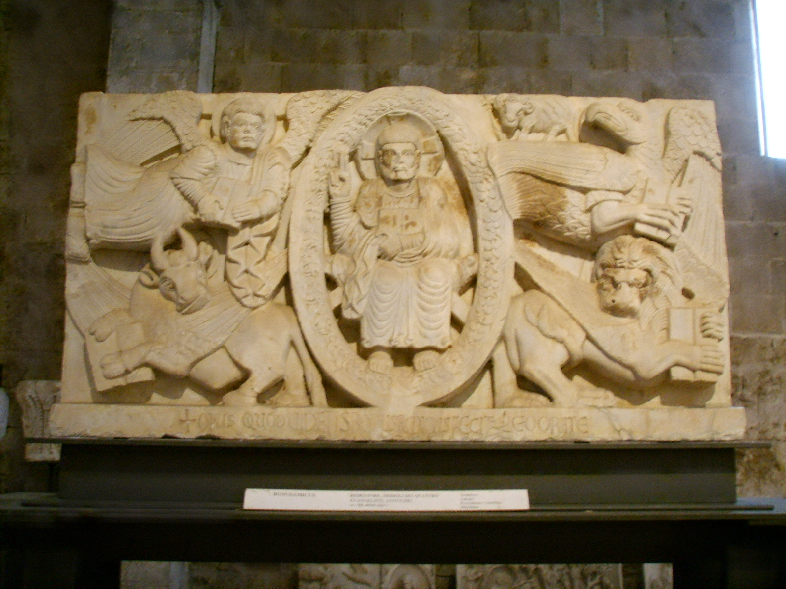 Museo di san matteo,bonusamicus, redentore e simboli degli evangelisti, ultimo quarto del XII secolo